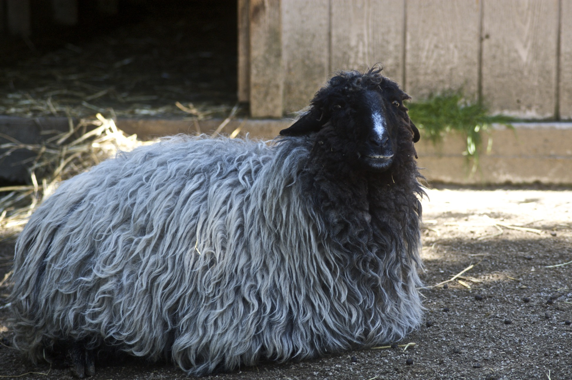 Karakul Sheep